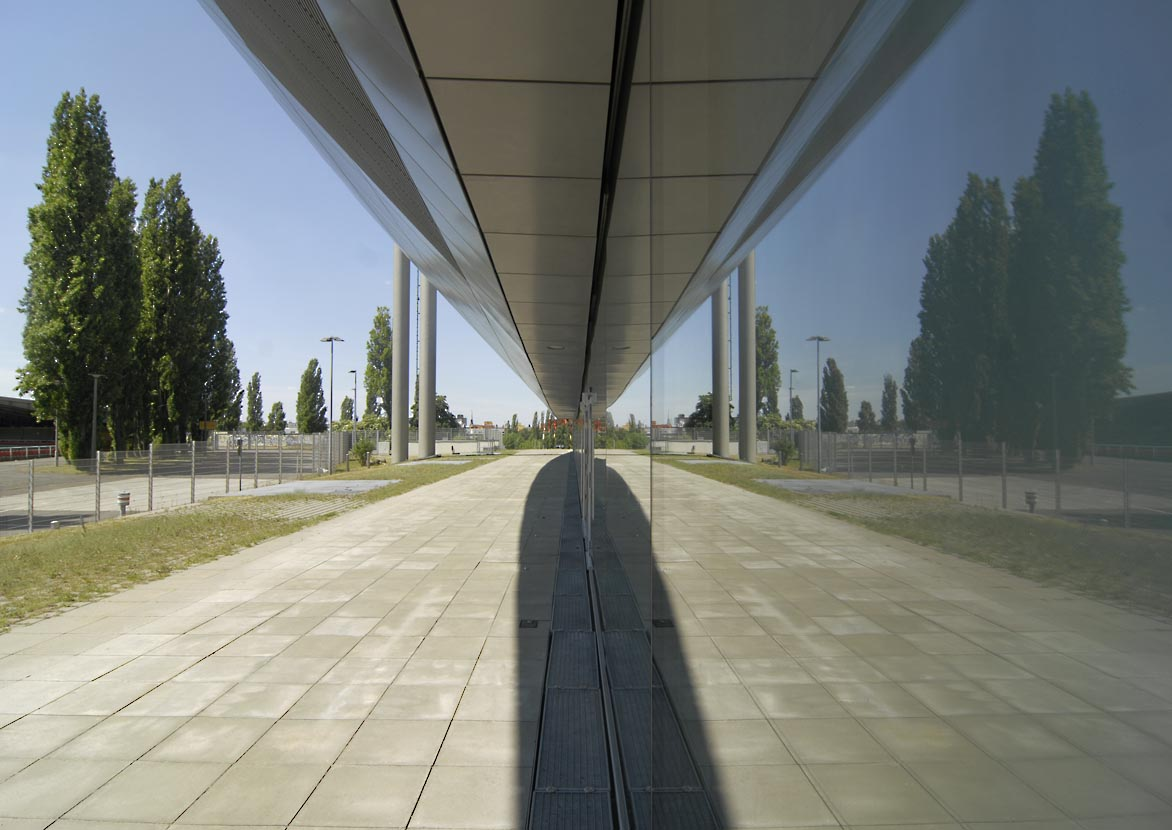 Außenansicht auf dem grünen Dach der Max-Schmeling-Halle-Berlin.